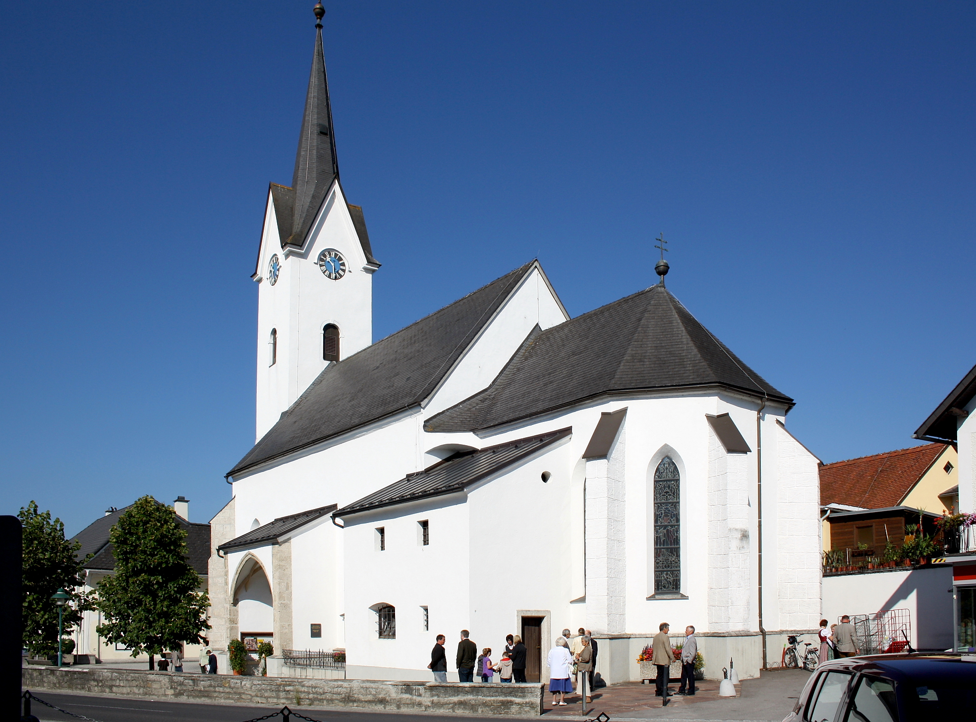 Pfarrkirche von der oberösterreichischen Gemeinde Gschwandt